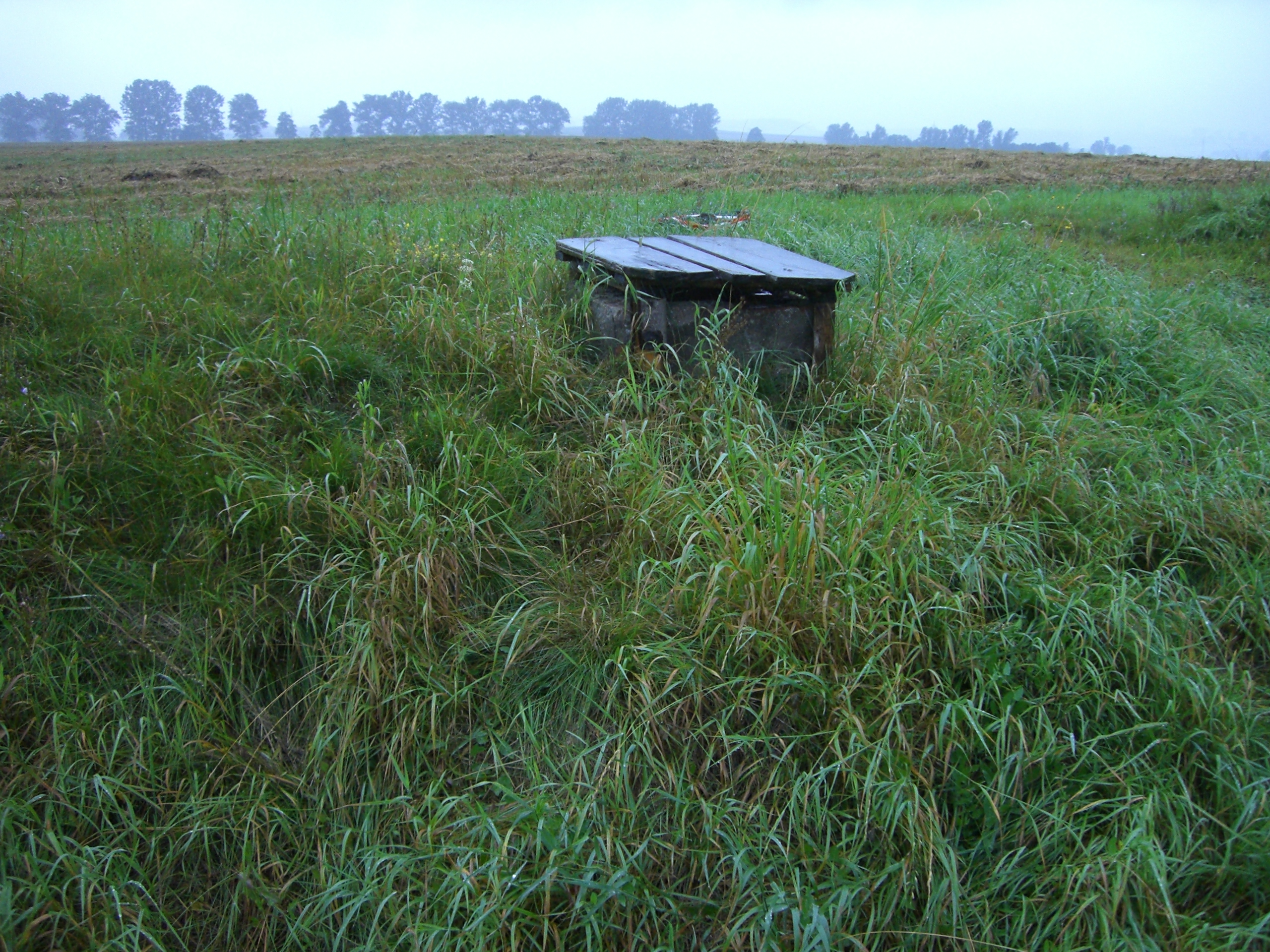 Abdeckung des Lüftungsschachts des Felsenkellers in Kaubenheim